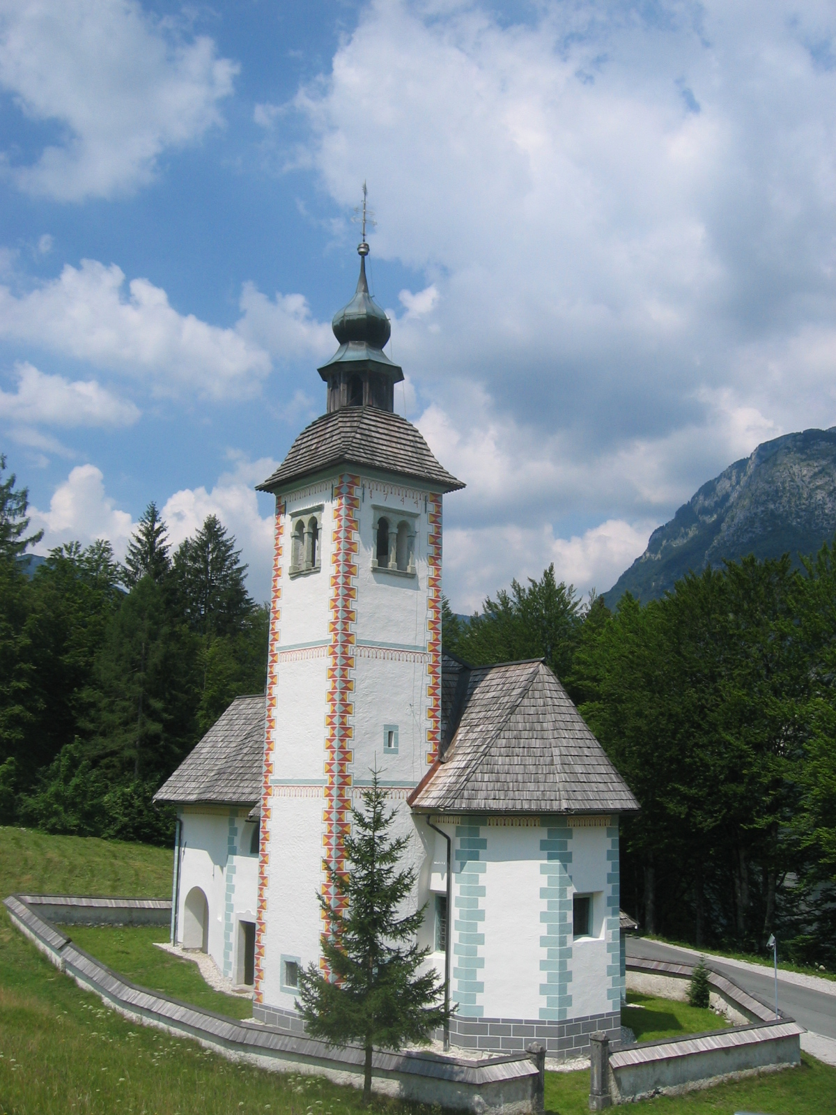 Cerkev sv.Duha, at Bohinj lake, Slovenia